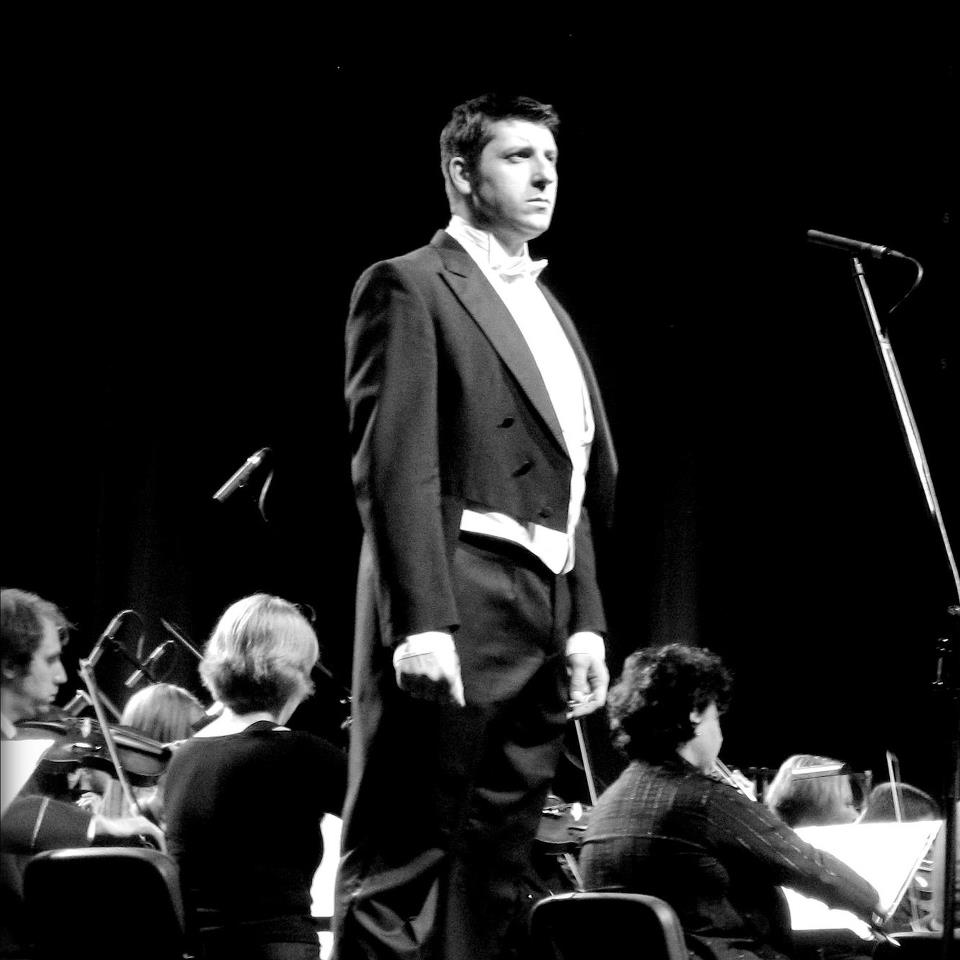 David Bizic